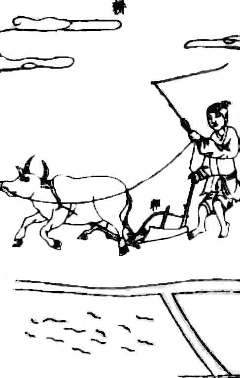 天工开物插图